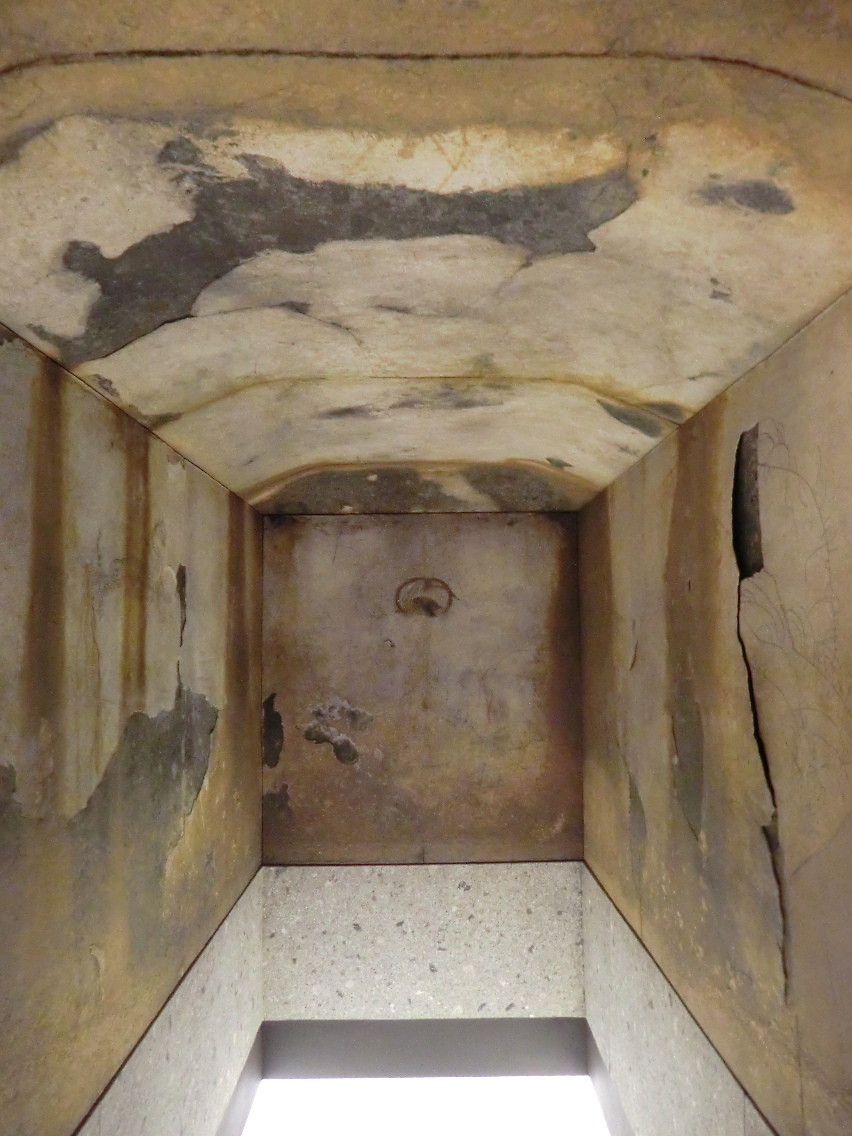 キトラ古墳石室模型 (「四神の館」にて)